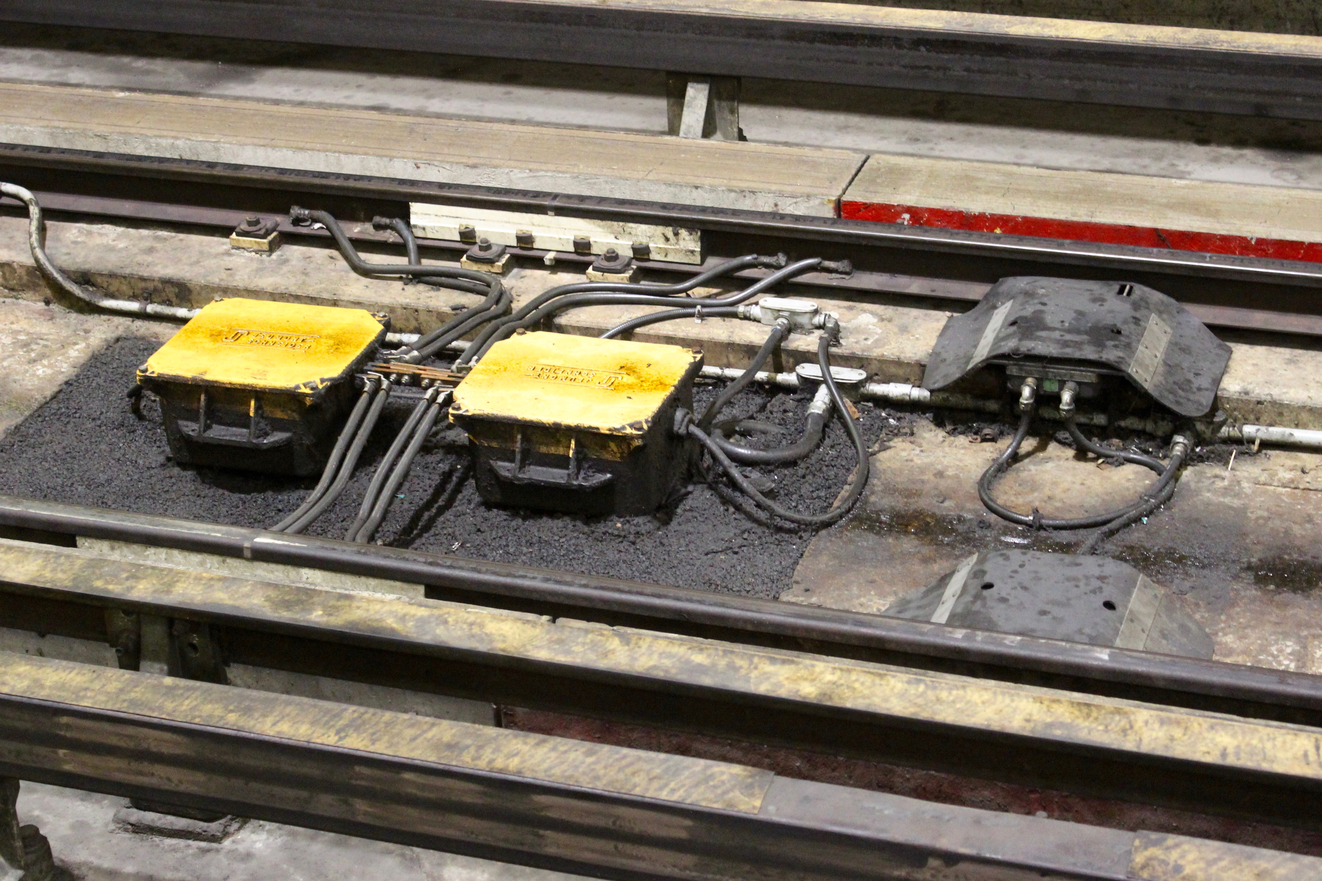 Connexions inductives (boites jaunes) et détecteur de crevaisons (boite noire)